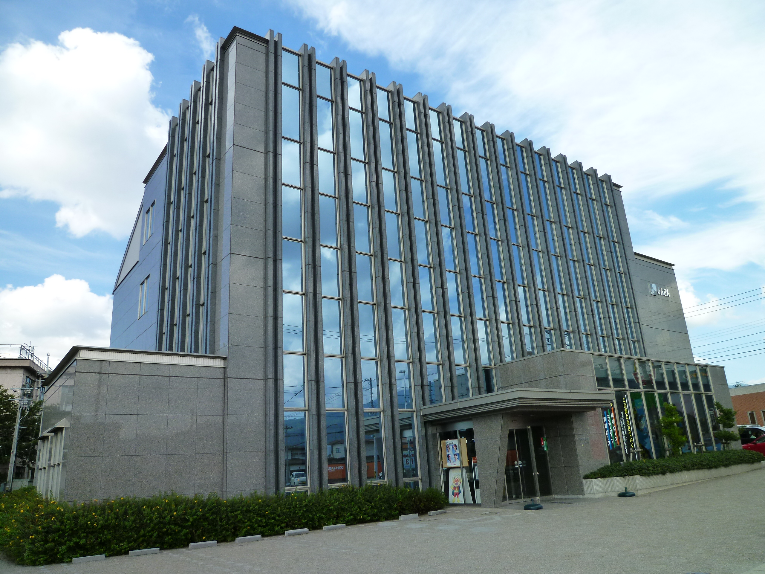 山形信用金庫本部兼荒楯支店（山形市鉄砲町）